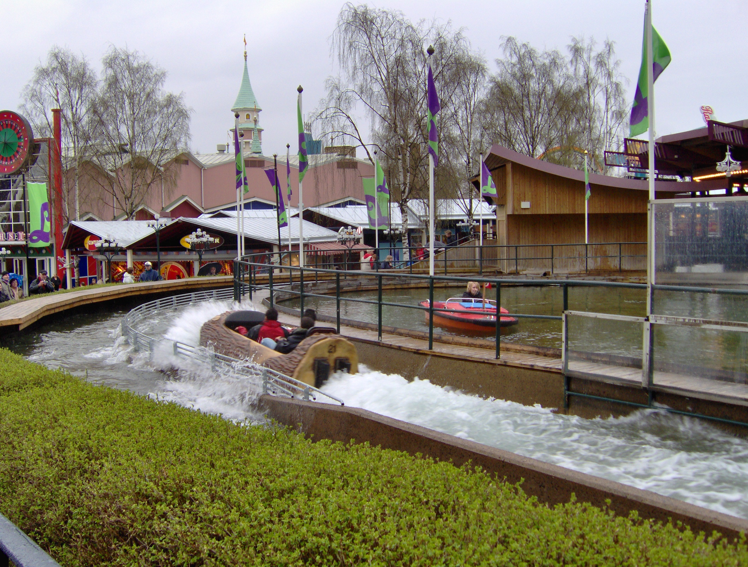 Liseberg valborg 2006